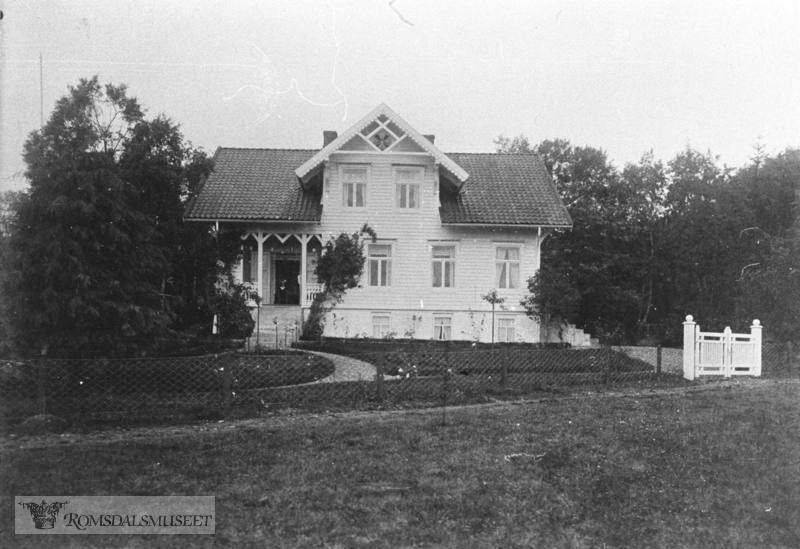 Breidablik 1888